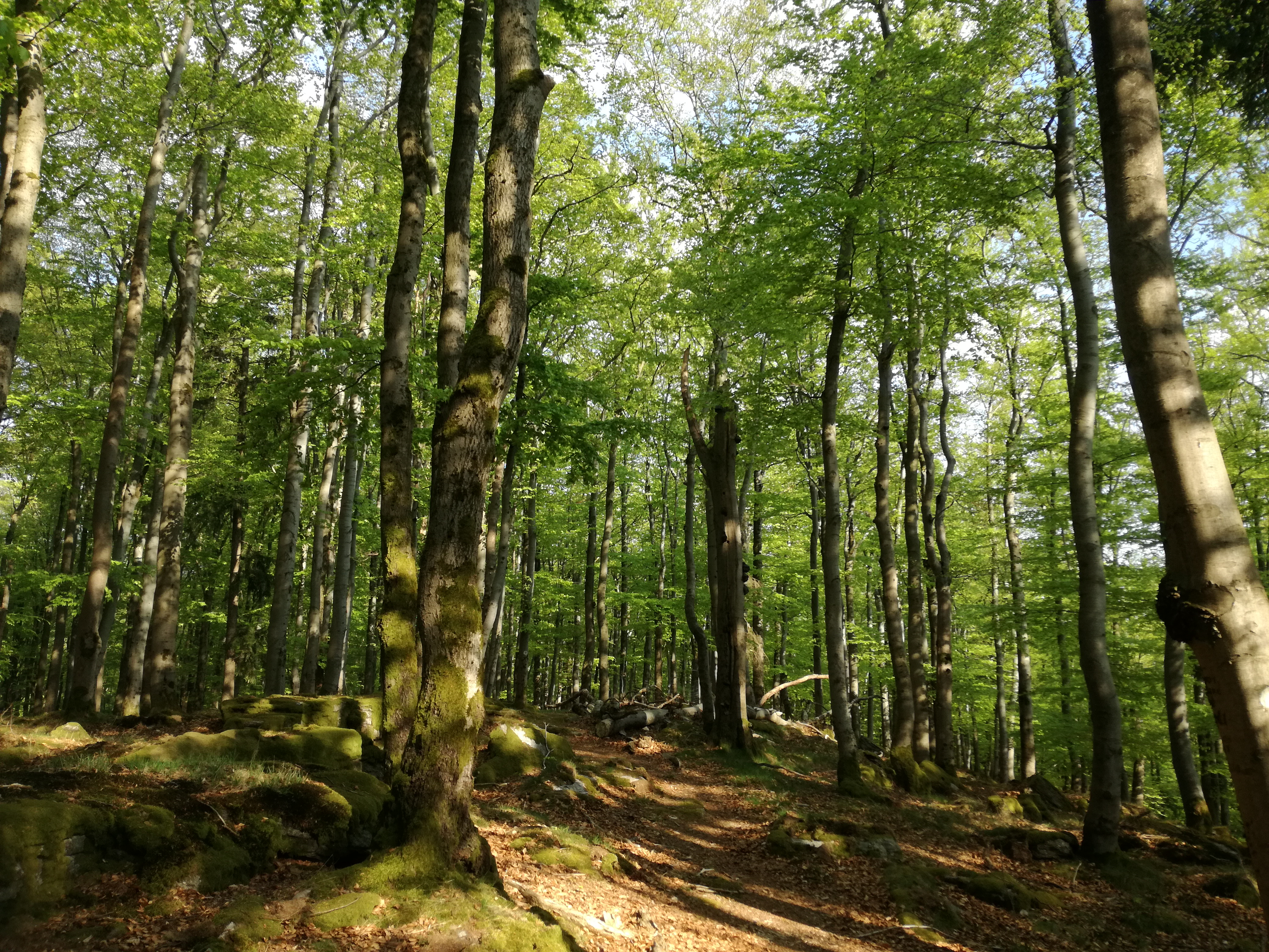 Der Buchenwald auf dem Buchberg 2018 am 22. April